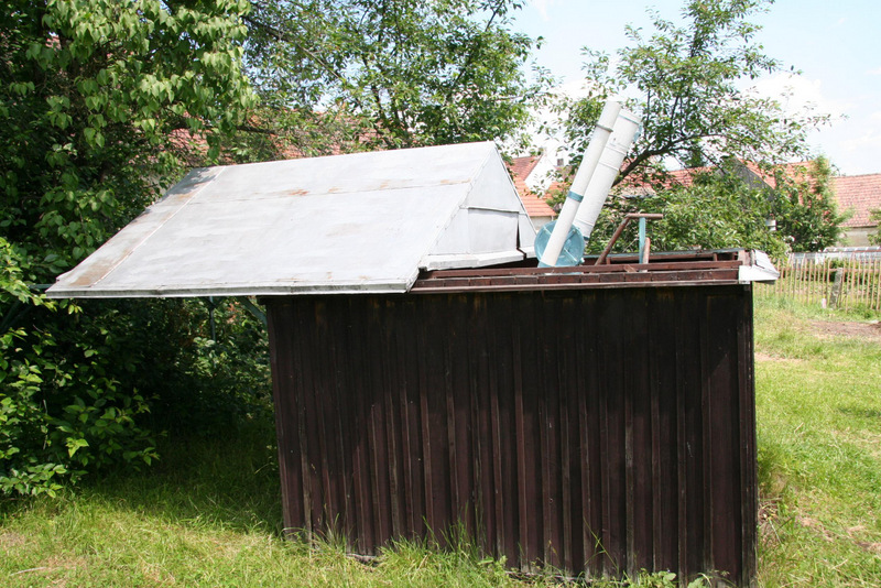 Ladislav Schmied-pozorovatelna Kunžak